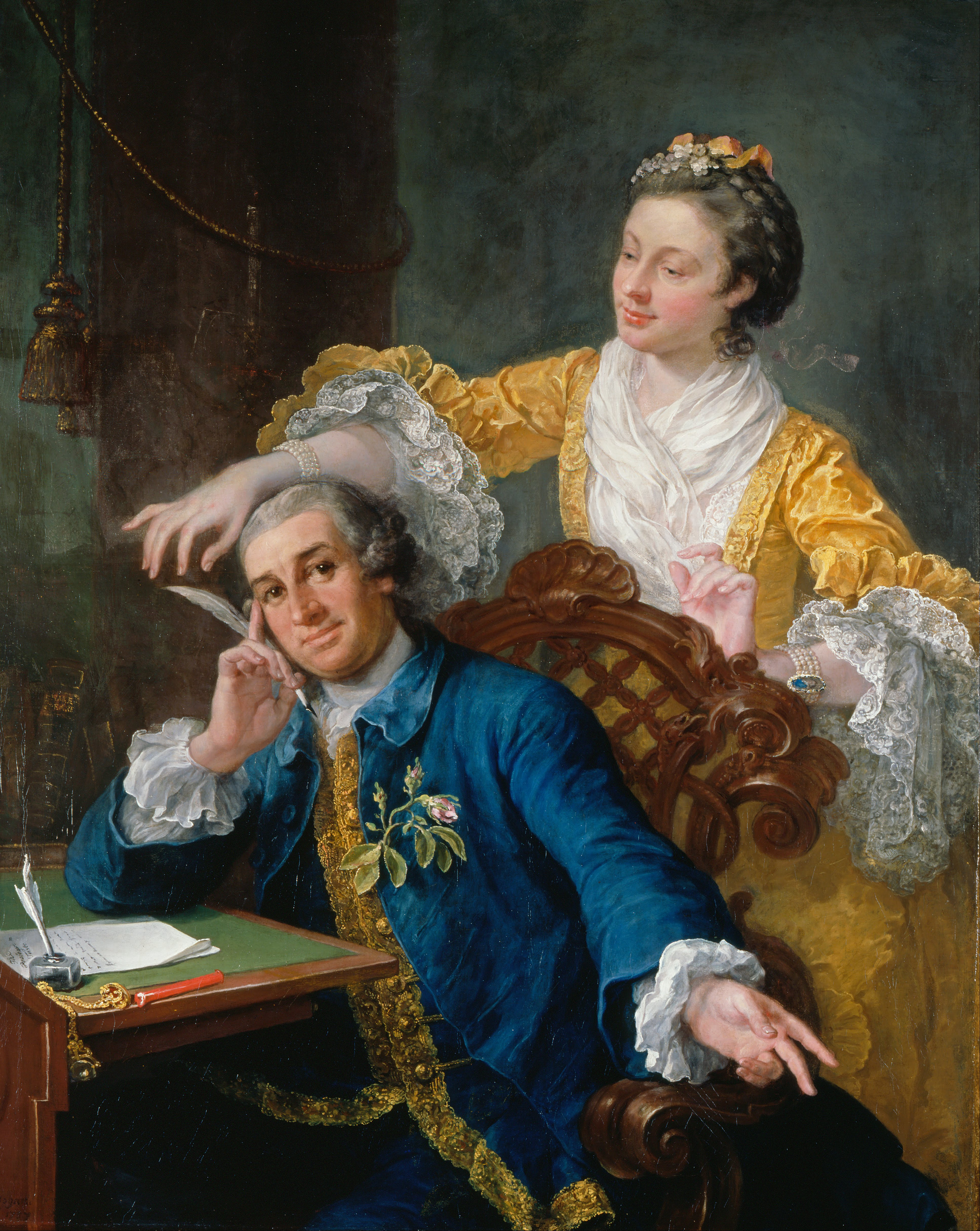 Garrick en tenue bleu et parements richement brodés, l'air rêveur, une plume à la main, est assis à un petit bureau dans le coin gauche de la pièce. Derrière son fauteuil en bois sculpté, son épouse, debout, dans une somptueuse robe de soie jaune, avec écharpe blanche nouée sur la gorge, la main tendue vers la plume au-dessus de la tête de son mari.